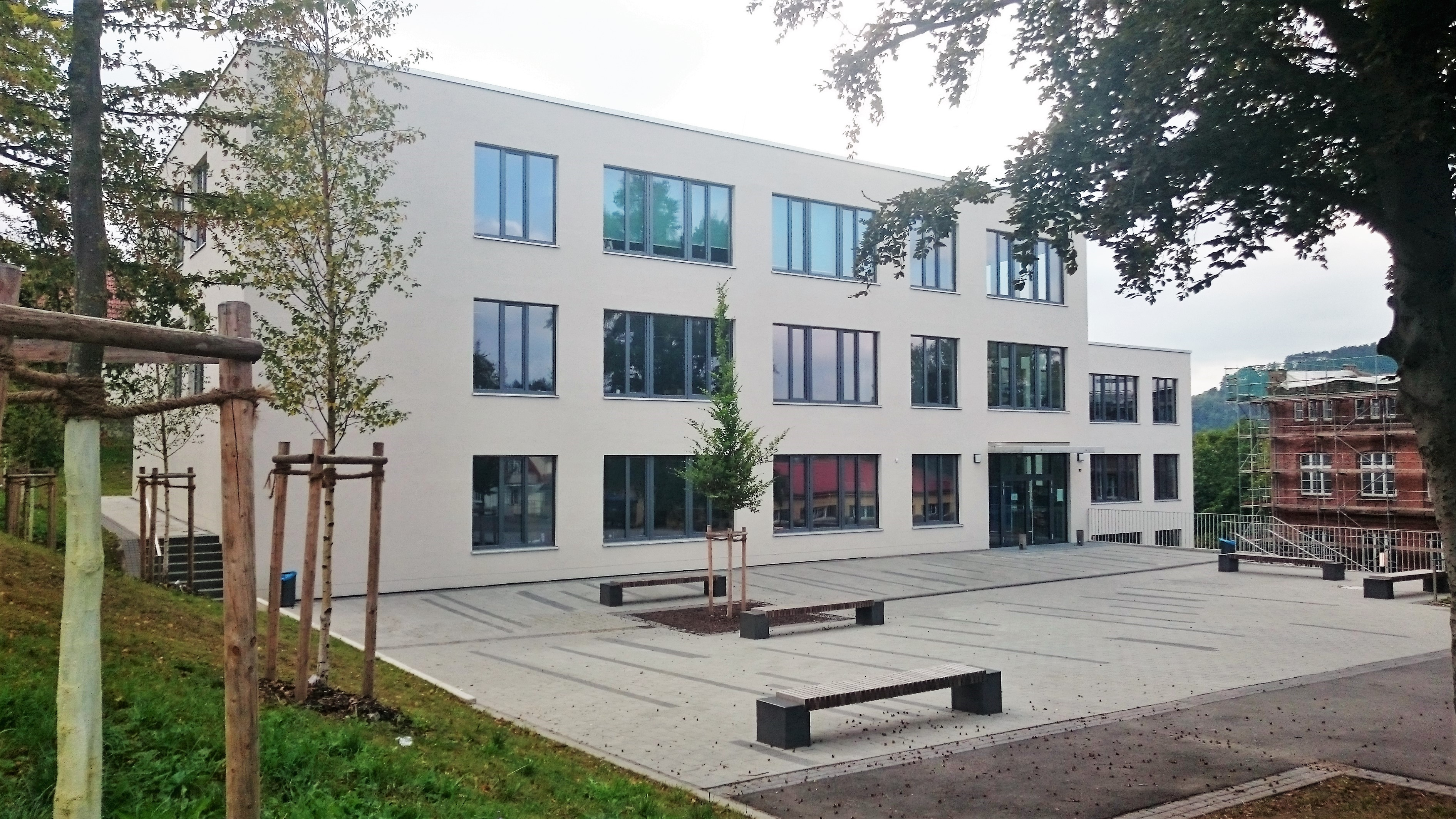 Neuerbautes Haus 2 des Evangelischen Gymnasiums in Meiningen, rechts ist ein kleiner Teil vom Haus 1 während der Sanierung sichtbar.